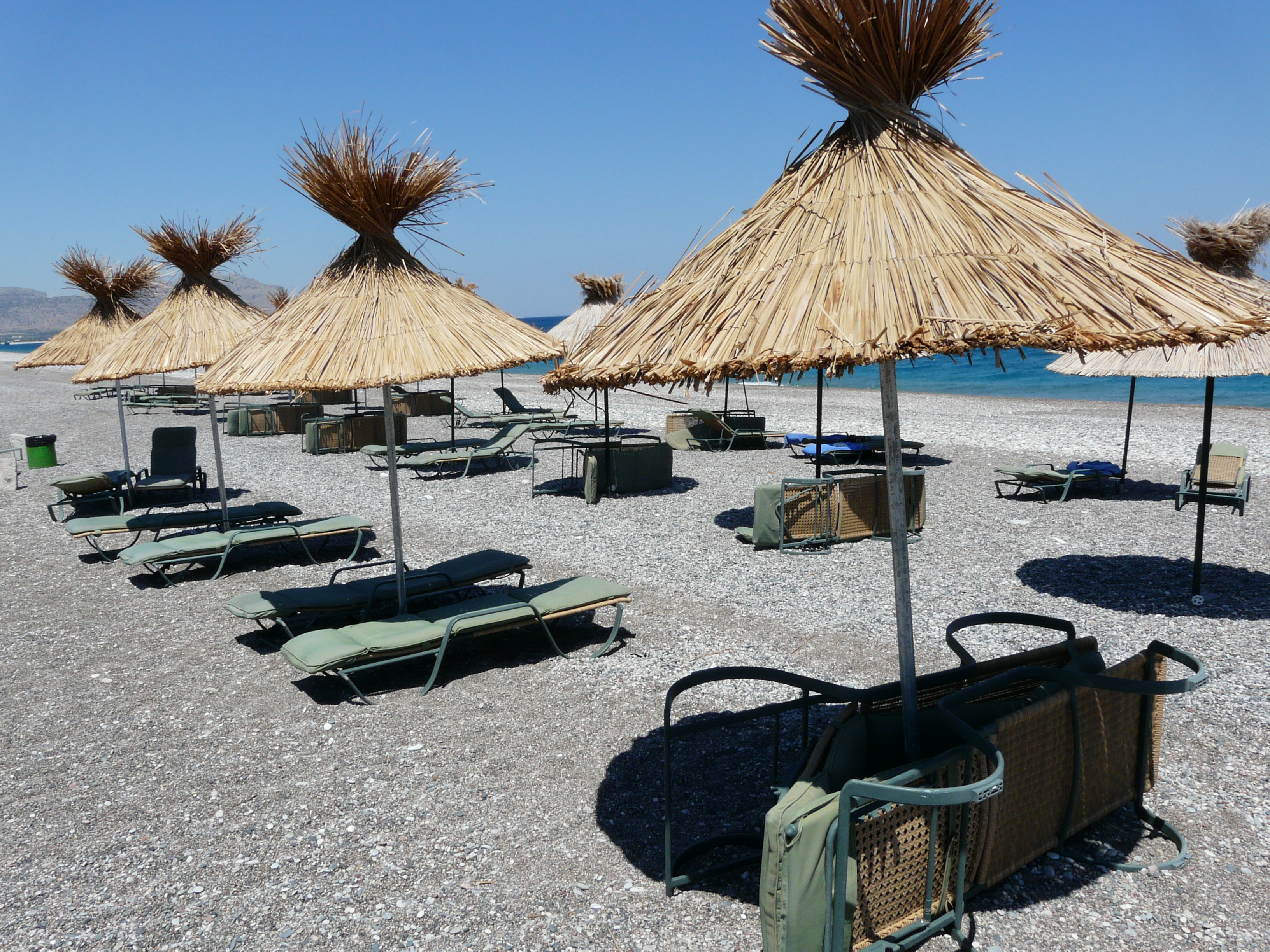 Rhodes